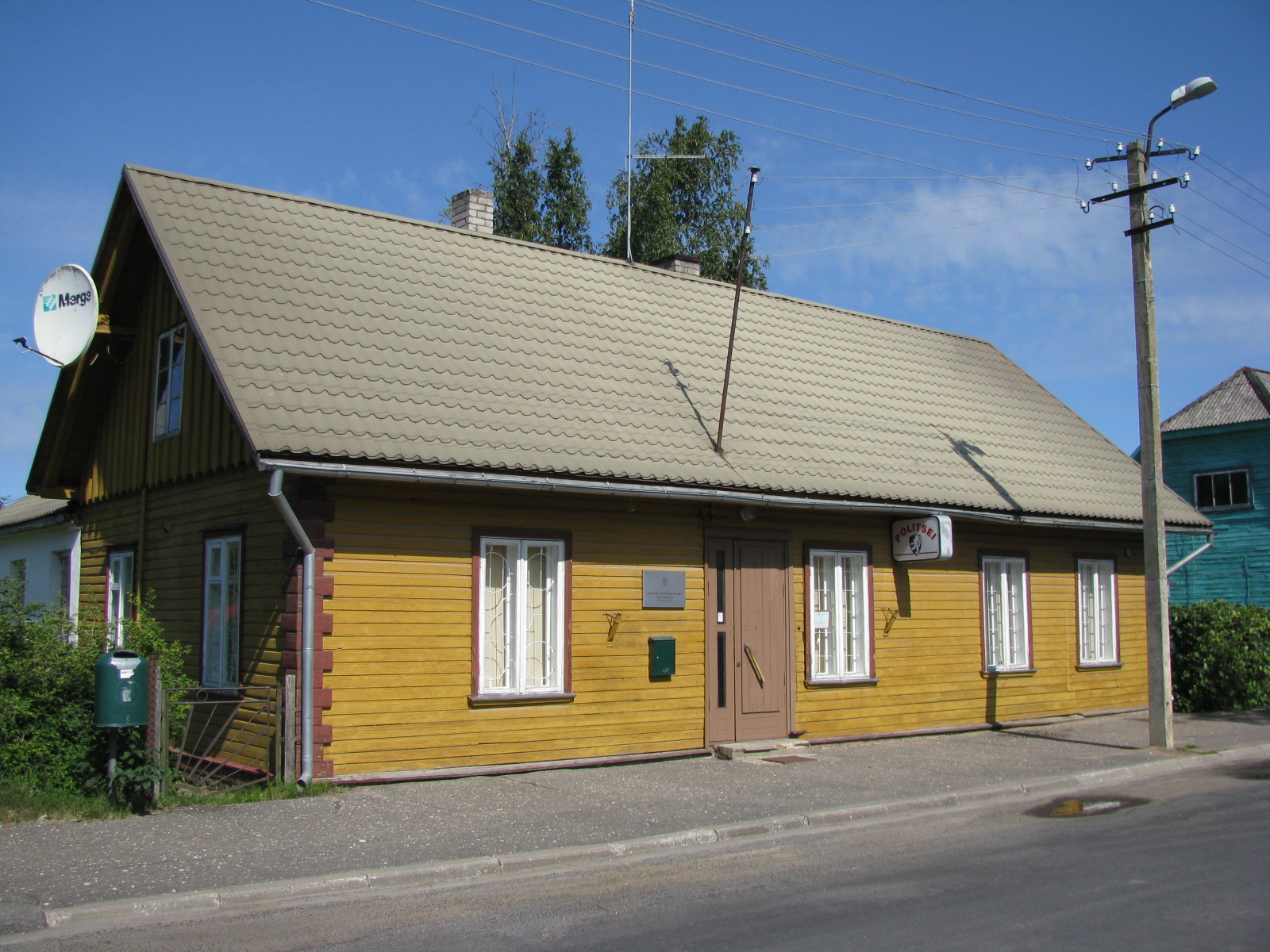 Veski tn 5